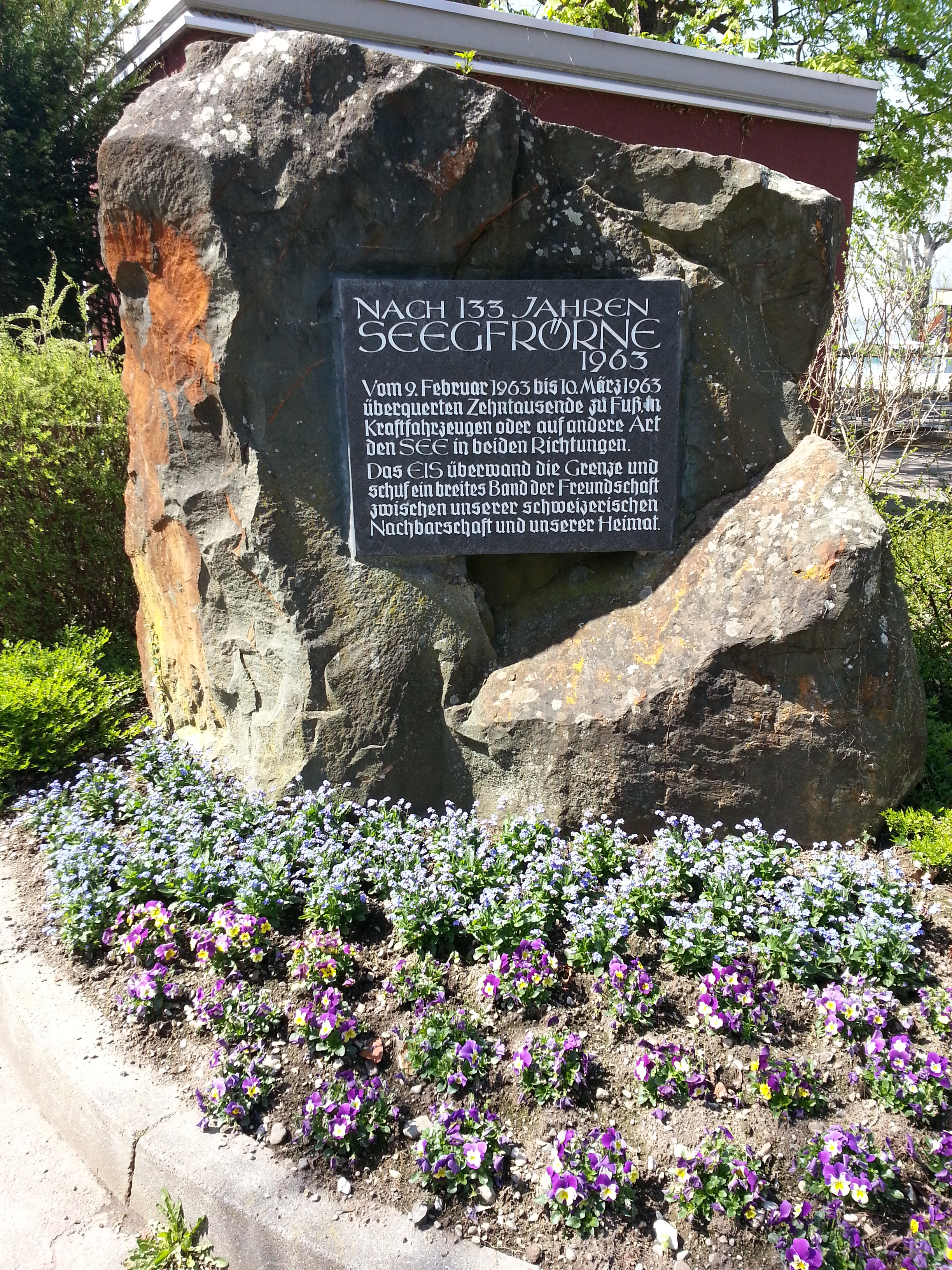 Deutschland - Bayern - Landkreis Lindau - Nonnenhorn: Gedenkstein 'Seegfrörne im Winter 1962/1963' am Strandbad